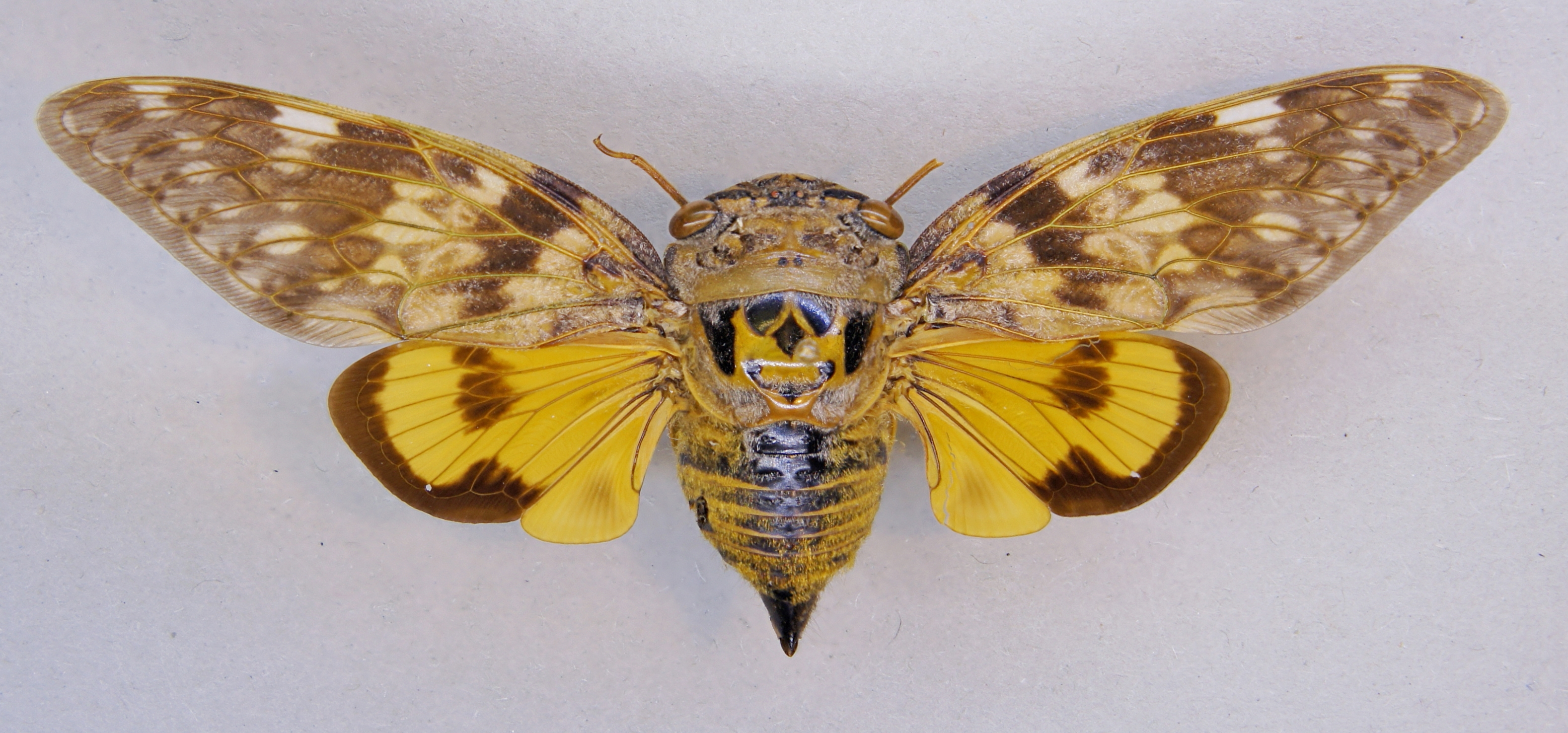 Platypleura mira (Distant, 1907) Herkunft: Thailand, Ching Mai